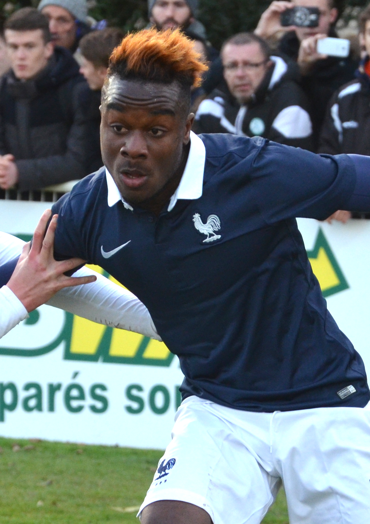 Photographie prise lors du match opposant la France à l'Angleterre pour les qualifications du championnat d'Europe de football des moins de 19 ans 2015 au stade Louis-Villemer de Saint-Lô le 31 mars 2015. Ici, Maxwell Cornet.